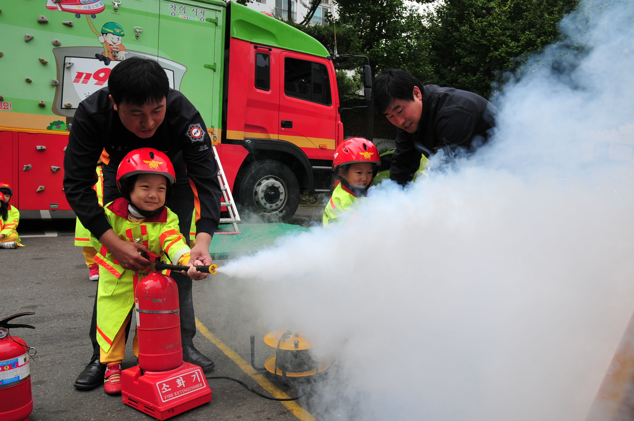 20101112강서소방서 안전교육 및 체험사진